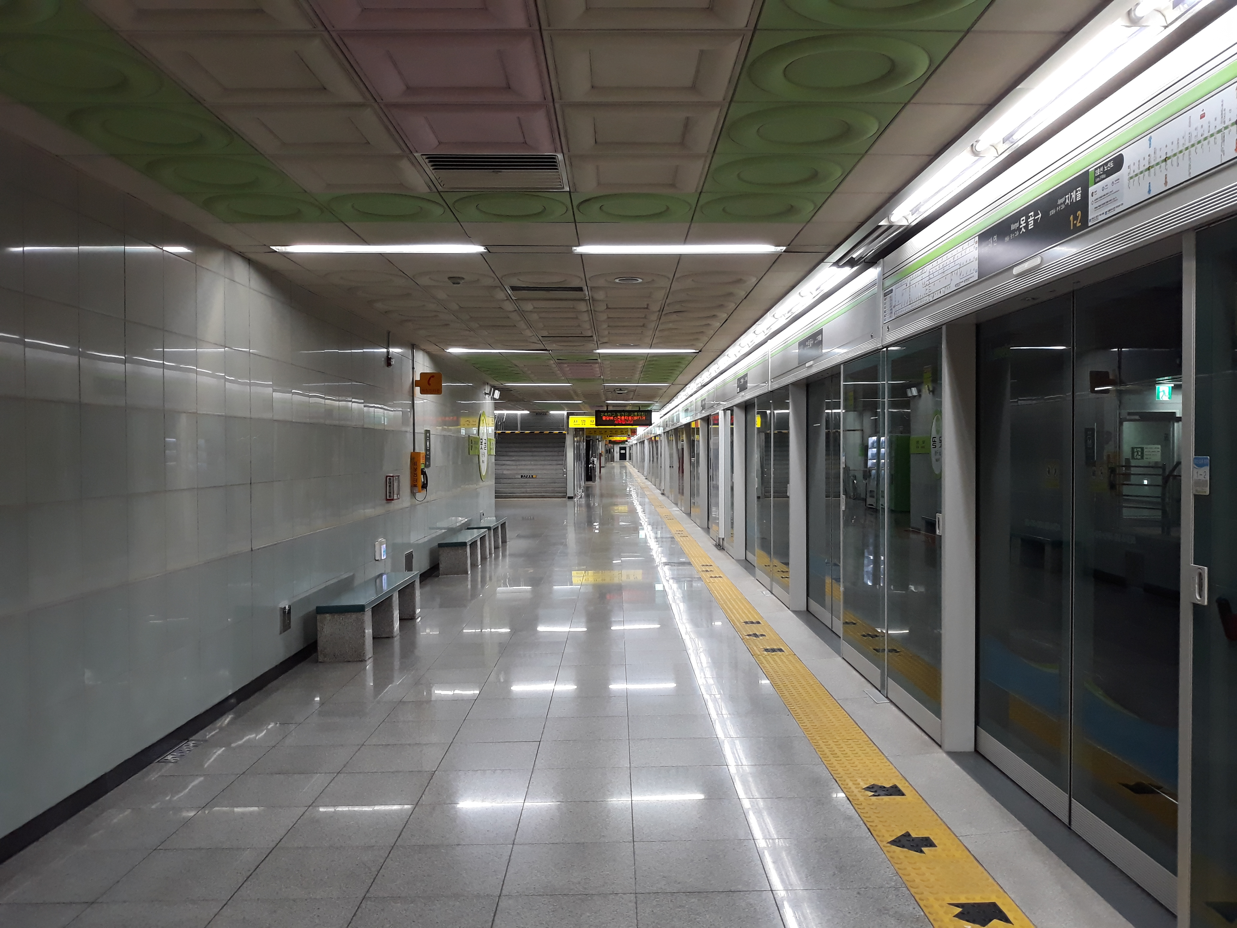 부산 도시철도 2호선 못골역 양산 방면 승강장